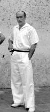 Atano IV in 1946